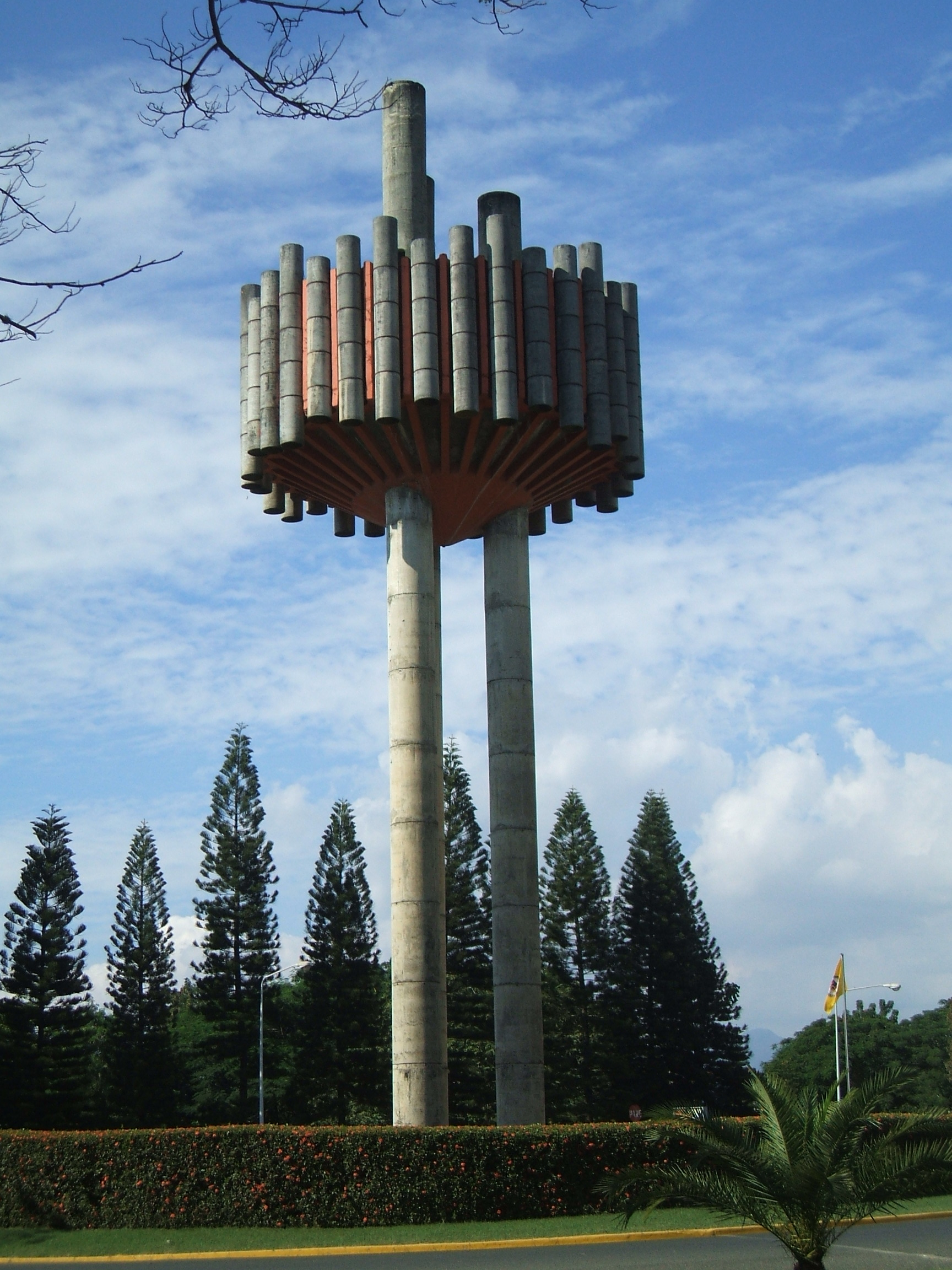 Tanque de la Pontificia Universidad Católica Madre y Maestra.